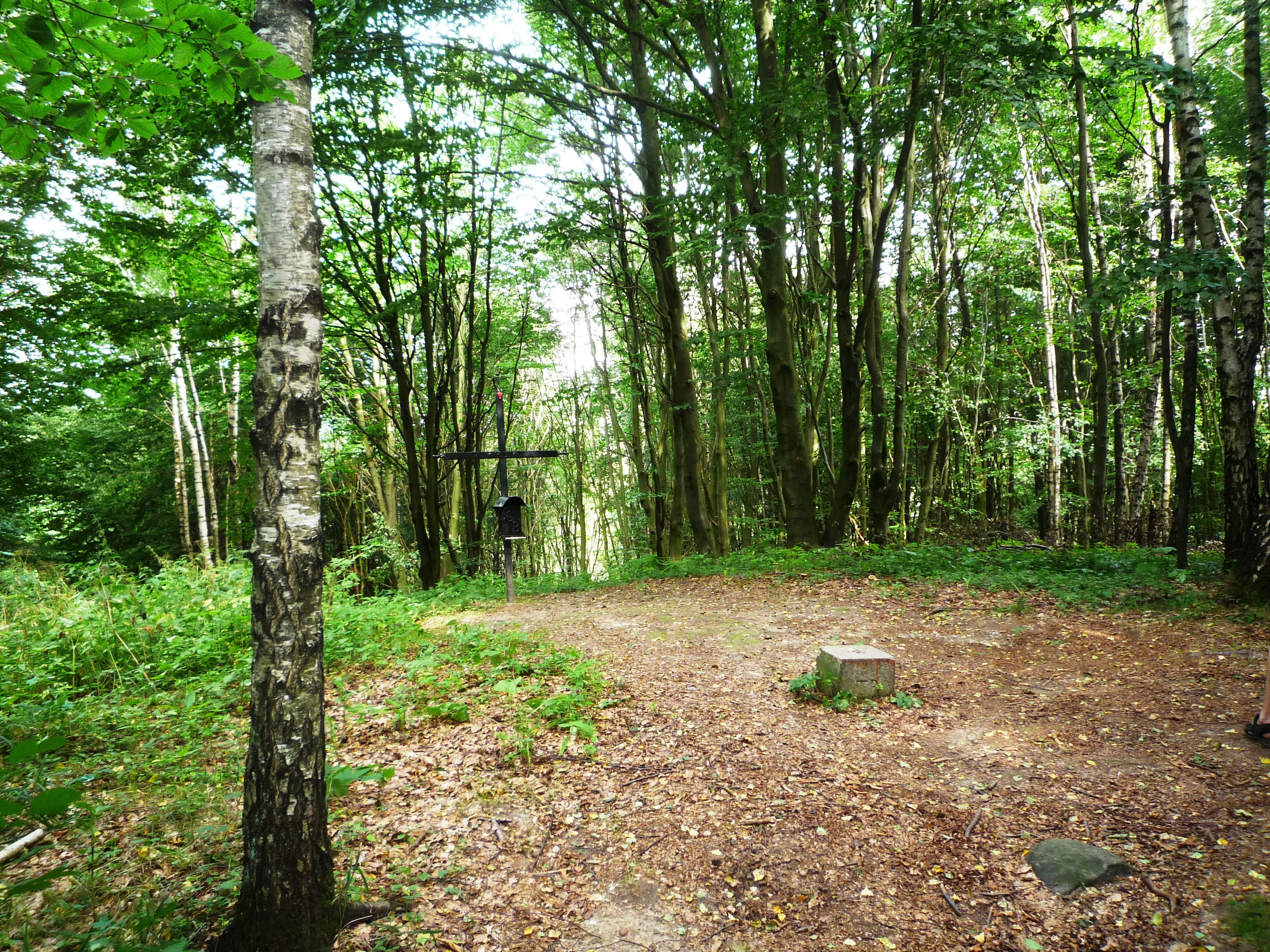 Höchster Punkt von Mecklenburg-Vorpommern